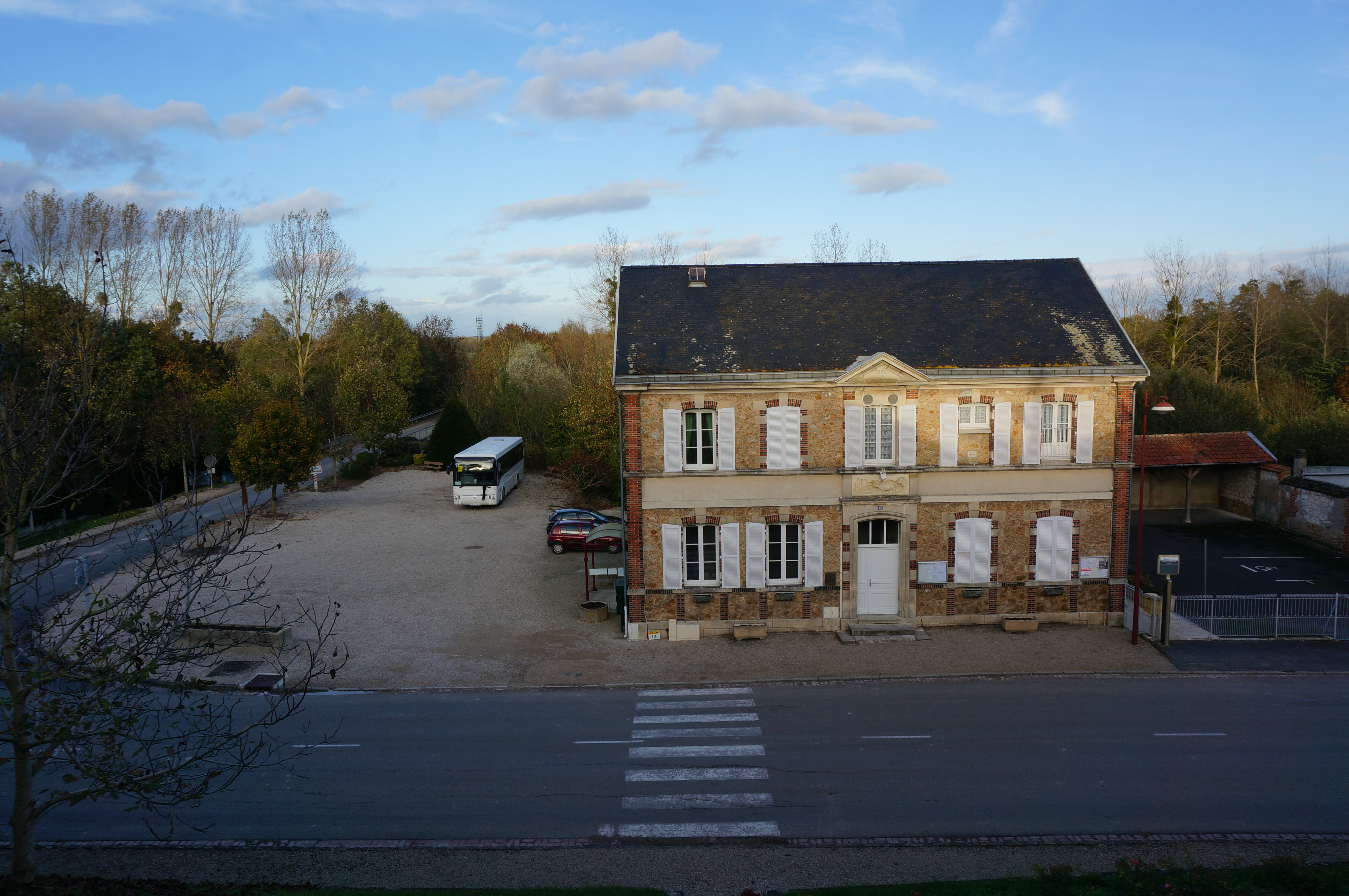 Dans la village.